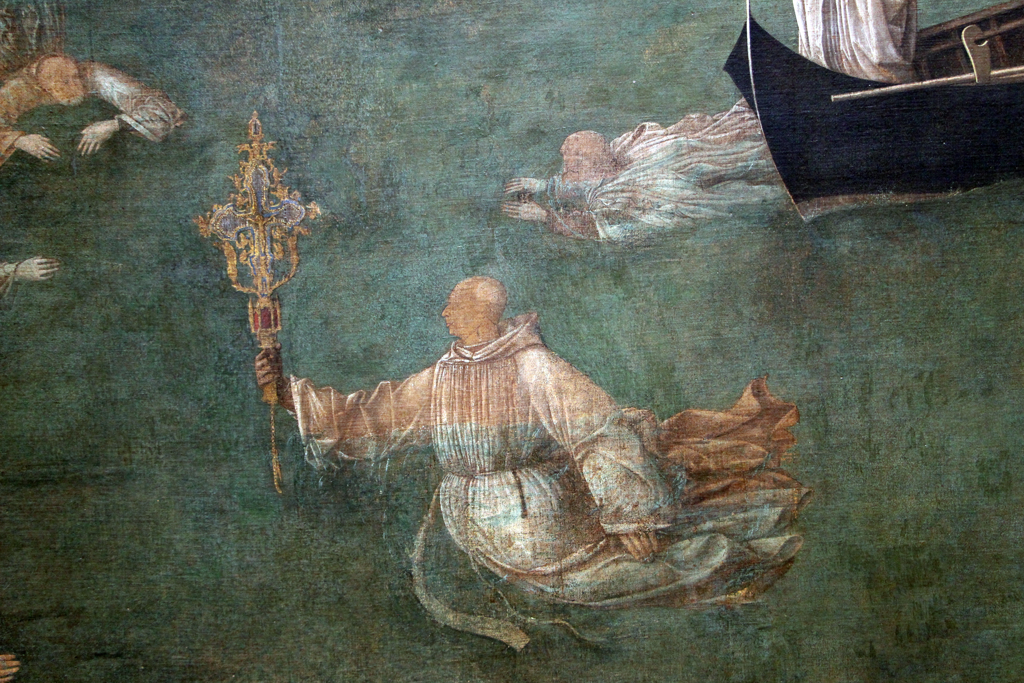 Gallerie dell'Accademia - MIBAC The making of this document was supported by Wikimedia CH. (Submit your project!) For all the files concerned, please see the category Supported by Wikimedia CH. This is a photo of a monument which is part of cultural heritage of Italy.